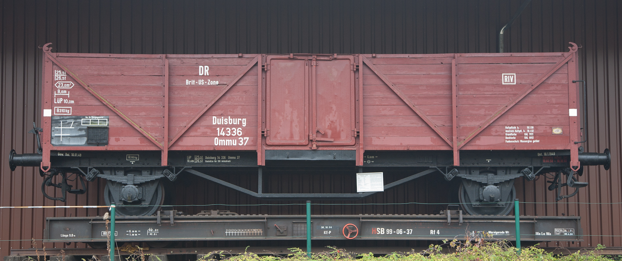 Güterwagen der Gattung Ommu37 der Deutschen Bundesbahn auf einem Rollwagen der Harzer Schmalspurbahnen (HSB)